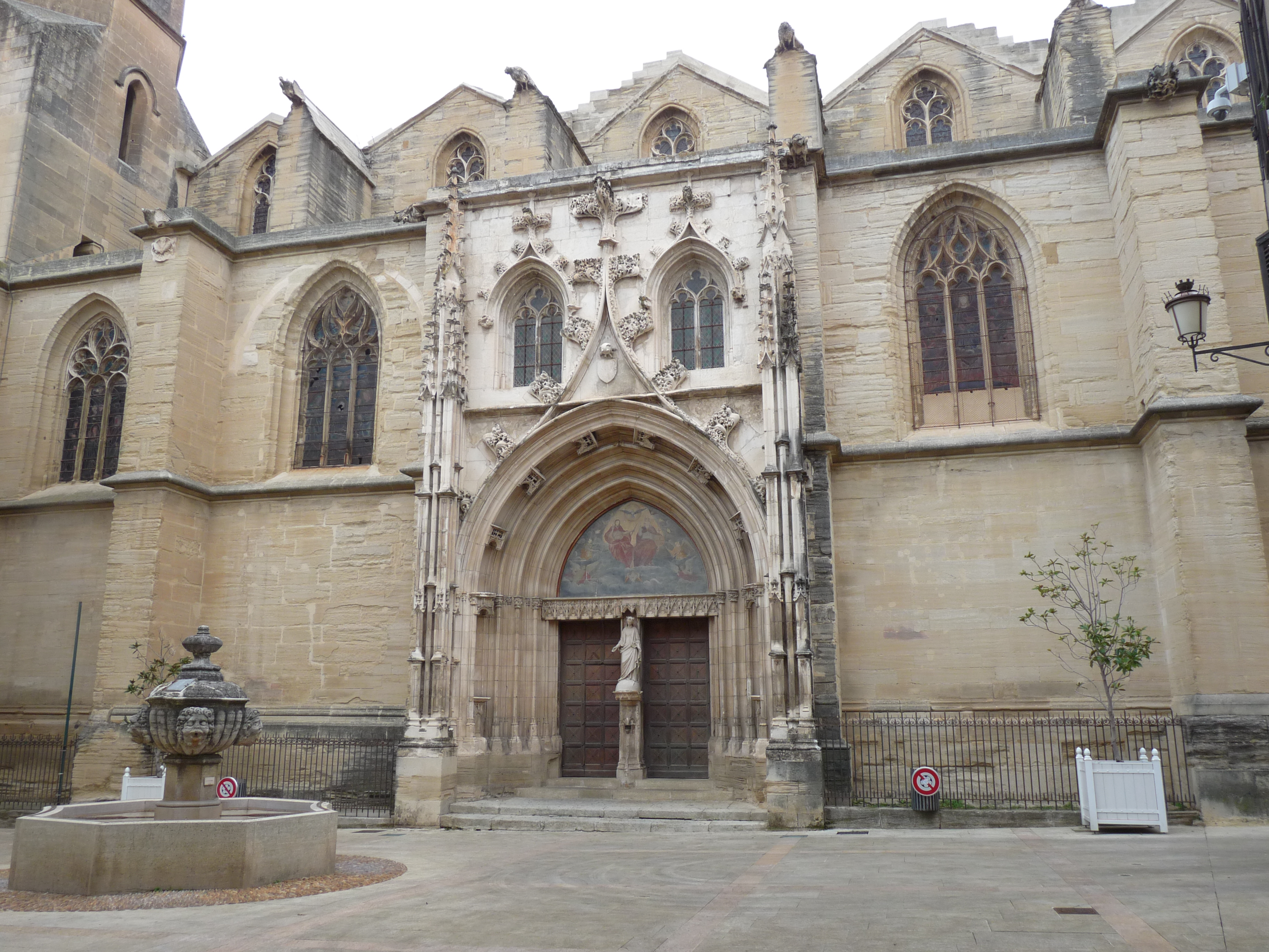 Carpentras kerk